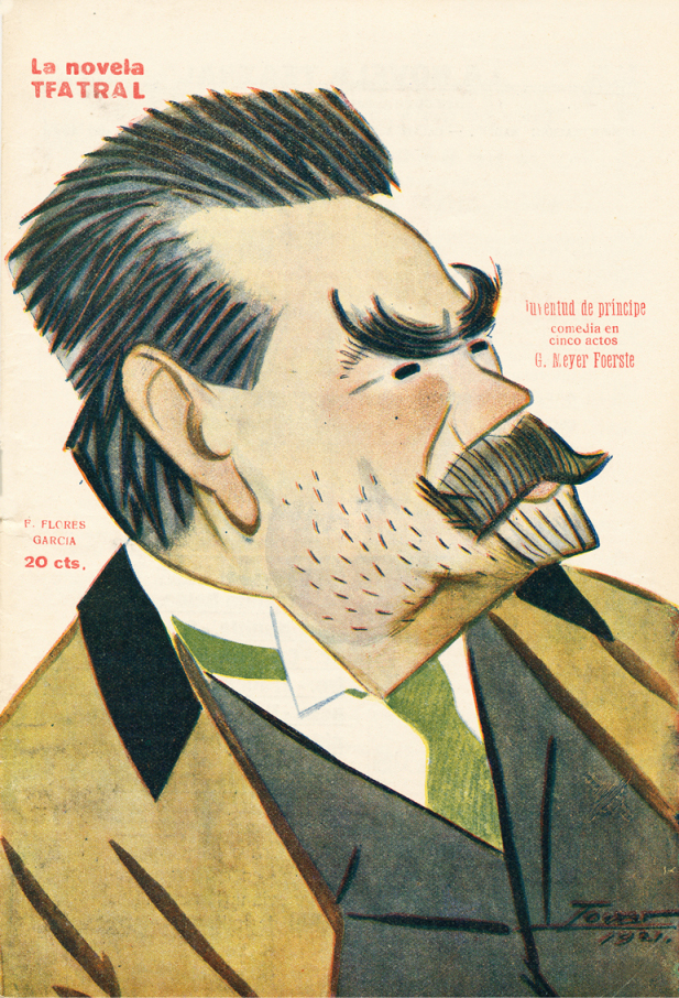 Ricardo Puga.